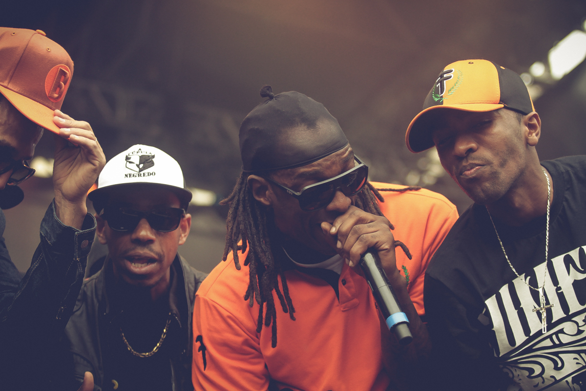 A Fita é o seguinte...